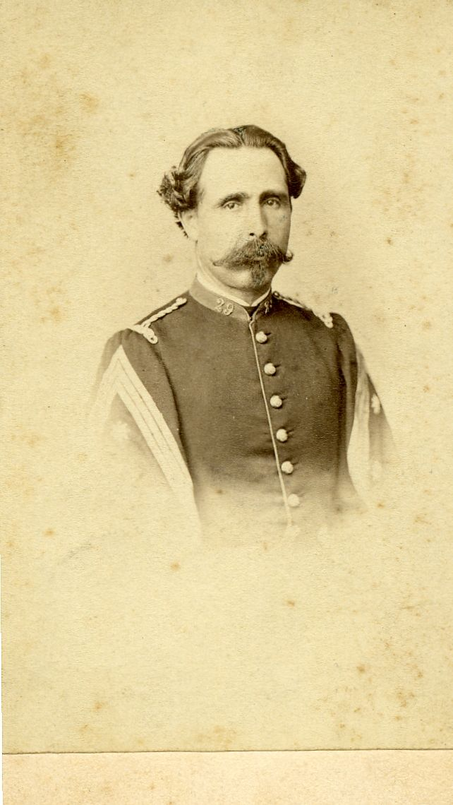 Coronel Valentín de Zárate e Isla, Gobernador Militar de Santiago de Cuba y Sagua la Grande (Cuba) y Alcalde Corregidor de Santiago de Cuba.